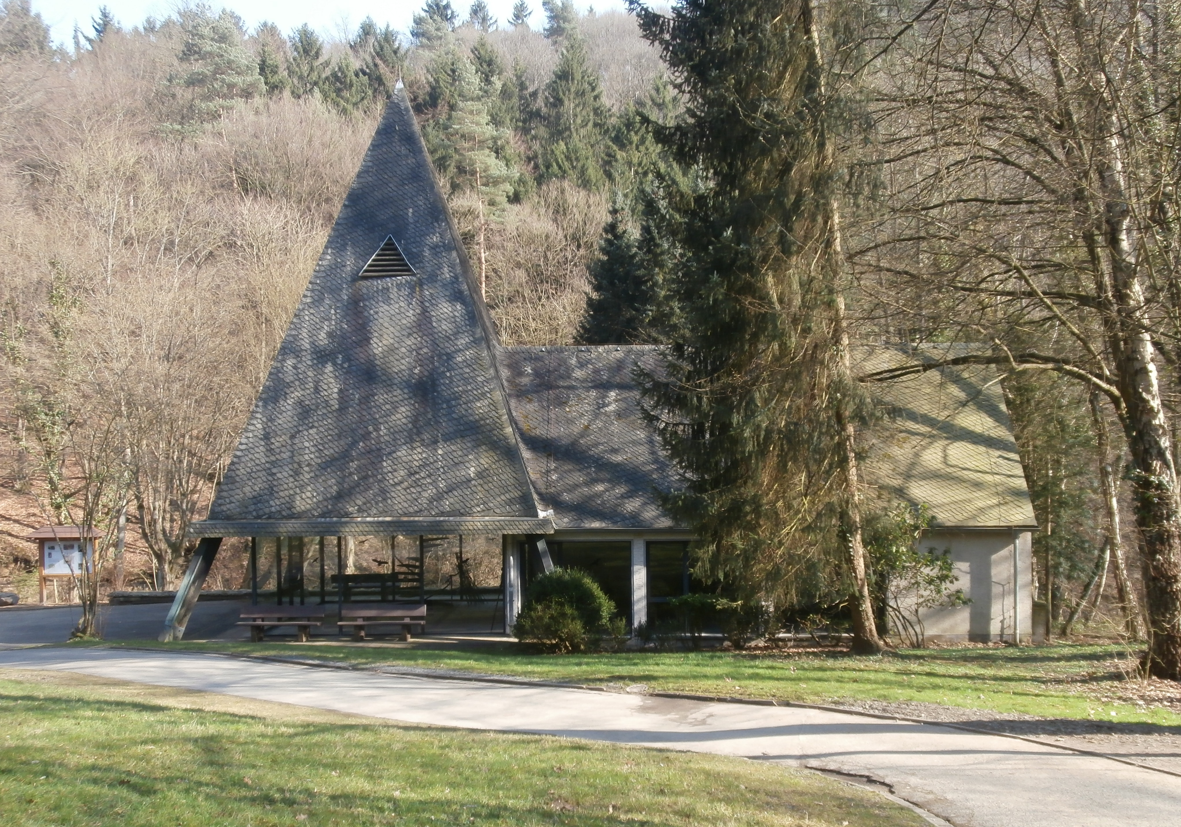 Waldfriedhof, Rhöndorf: neuere Friedhofskapelle